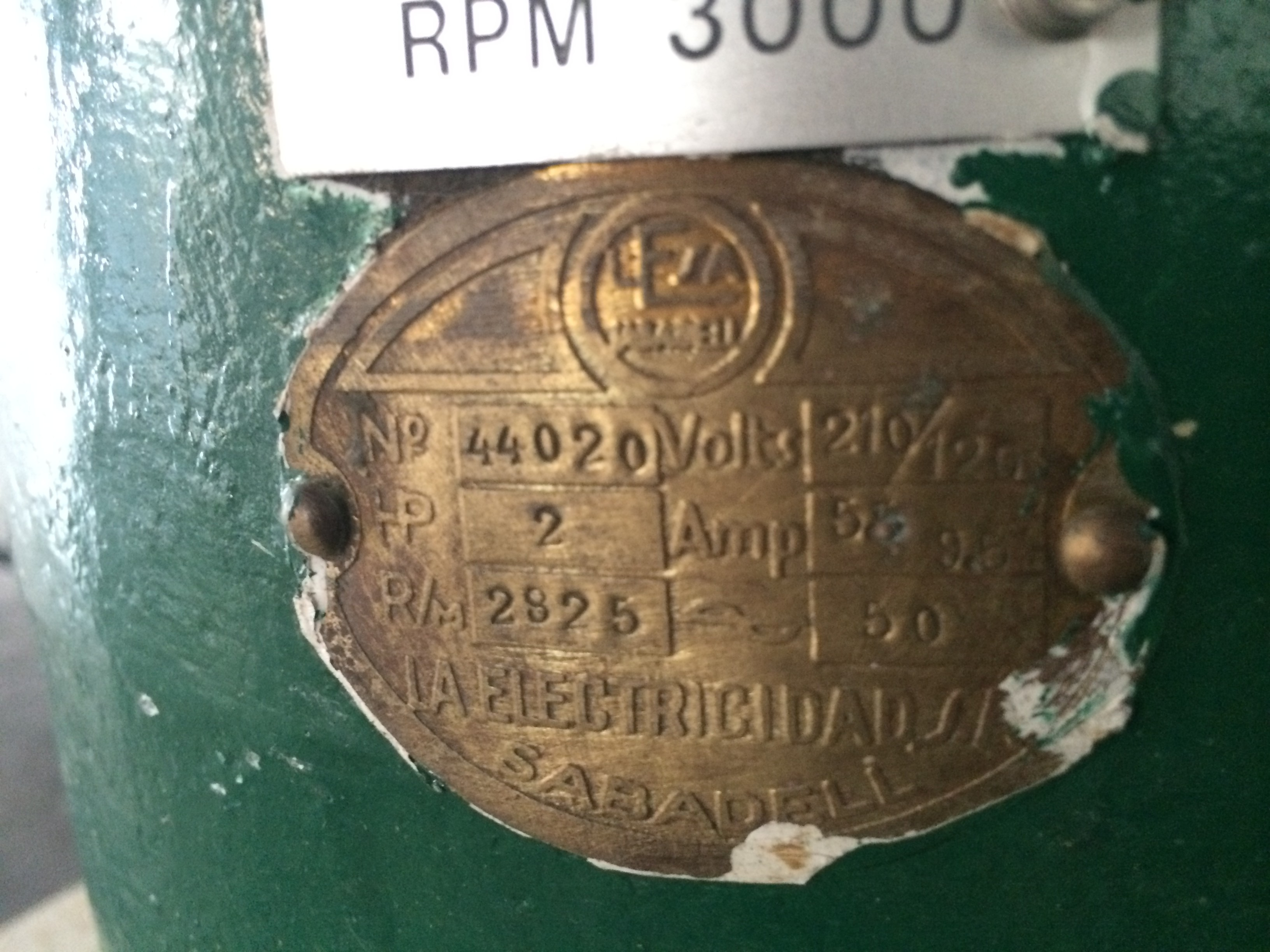 Placa de fabricació de la sirena d'alarma antiaèria de la fàbrica de pistoles d'Unceta y Cía, de Guernica, de la Guerra Civil espanyola (ca. setembre - novembre de 1936) (autor: Oier Plaza / Astra - Lobak).